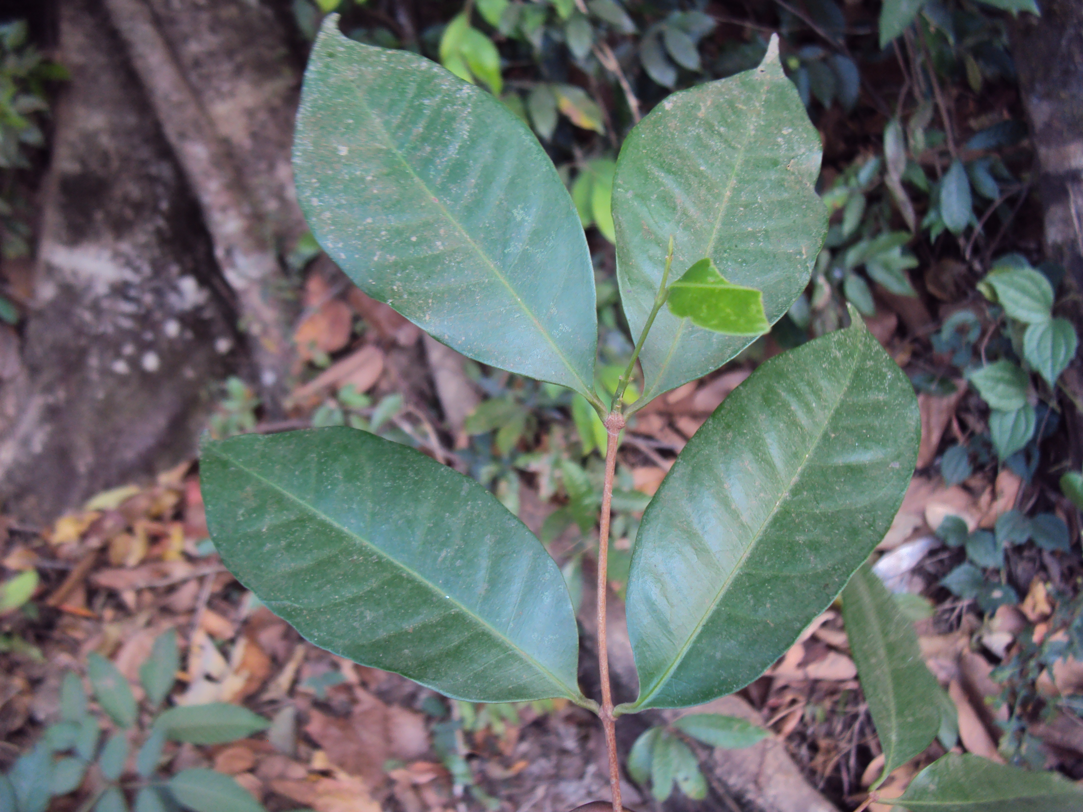 Photos by Vinayaraj